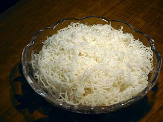 Rice Sevai